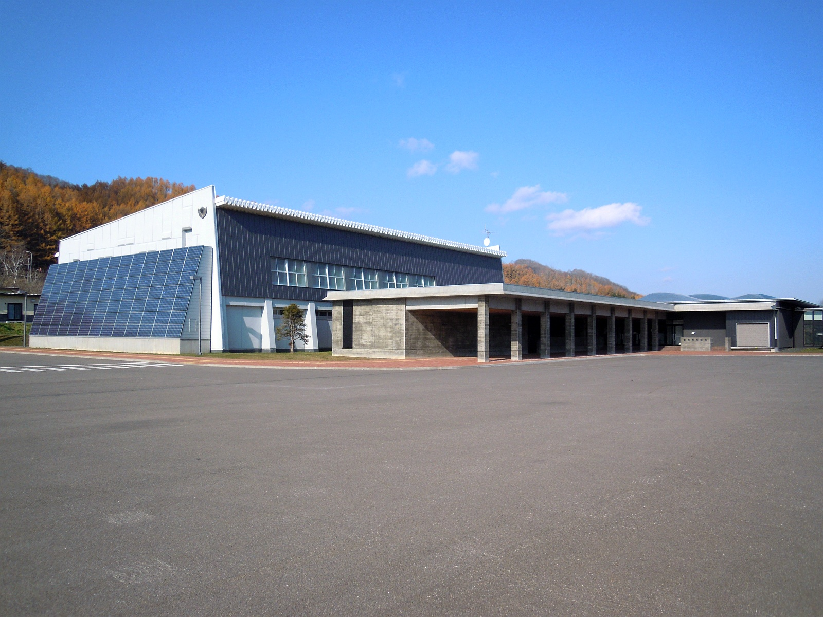 北海道足寄郡陸別町にある陸別小学校校舎。